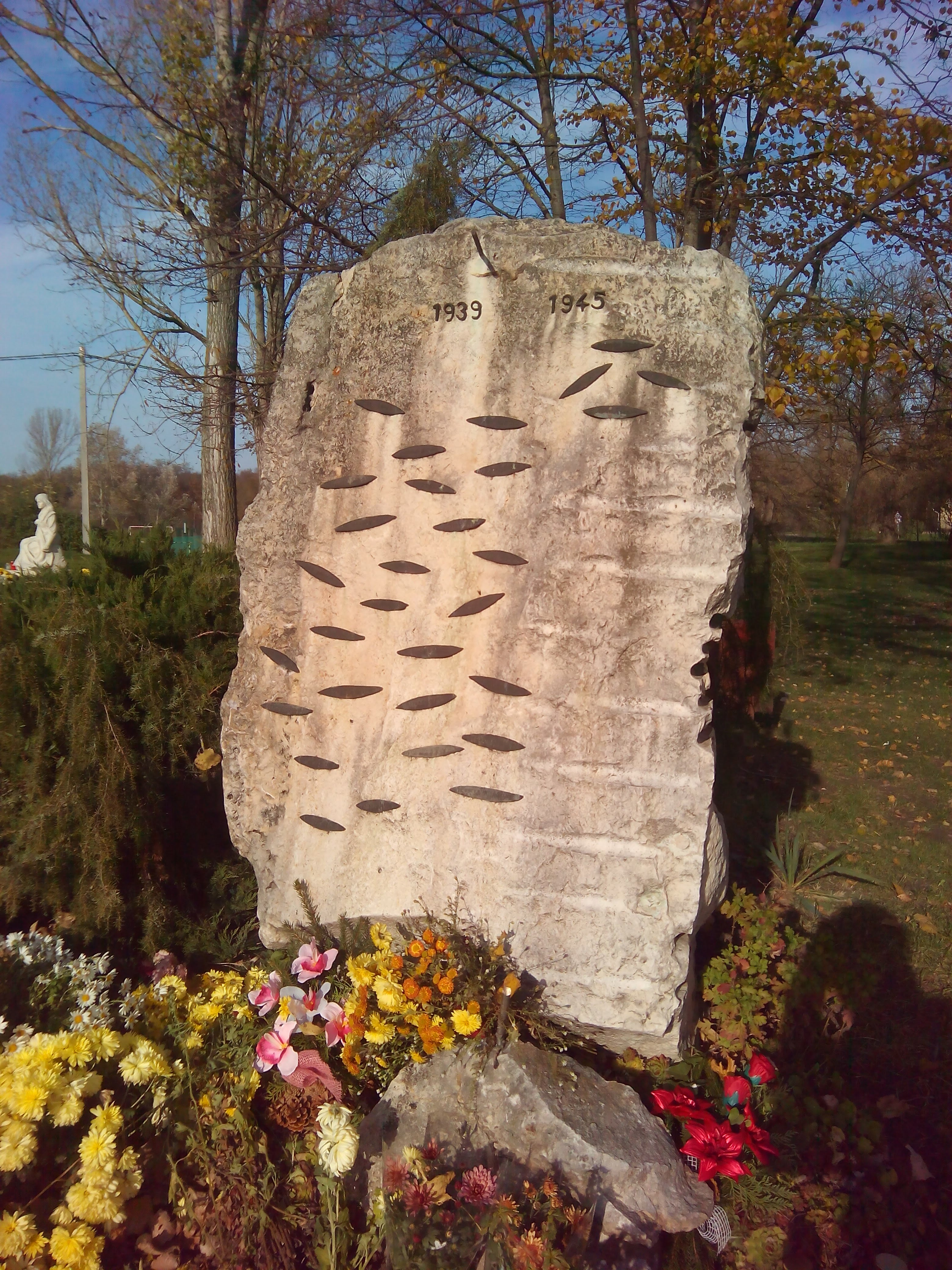 Káva II. világháborús emlékmű